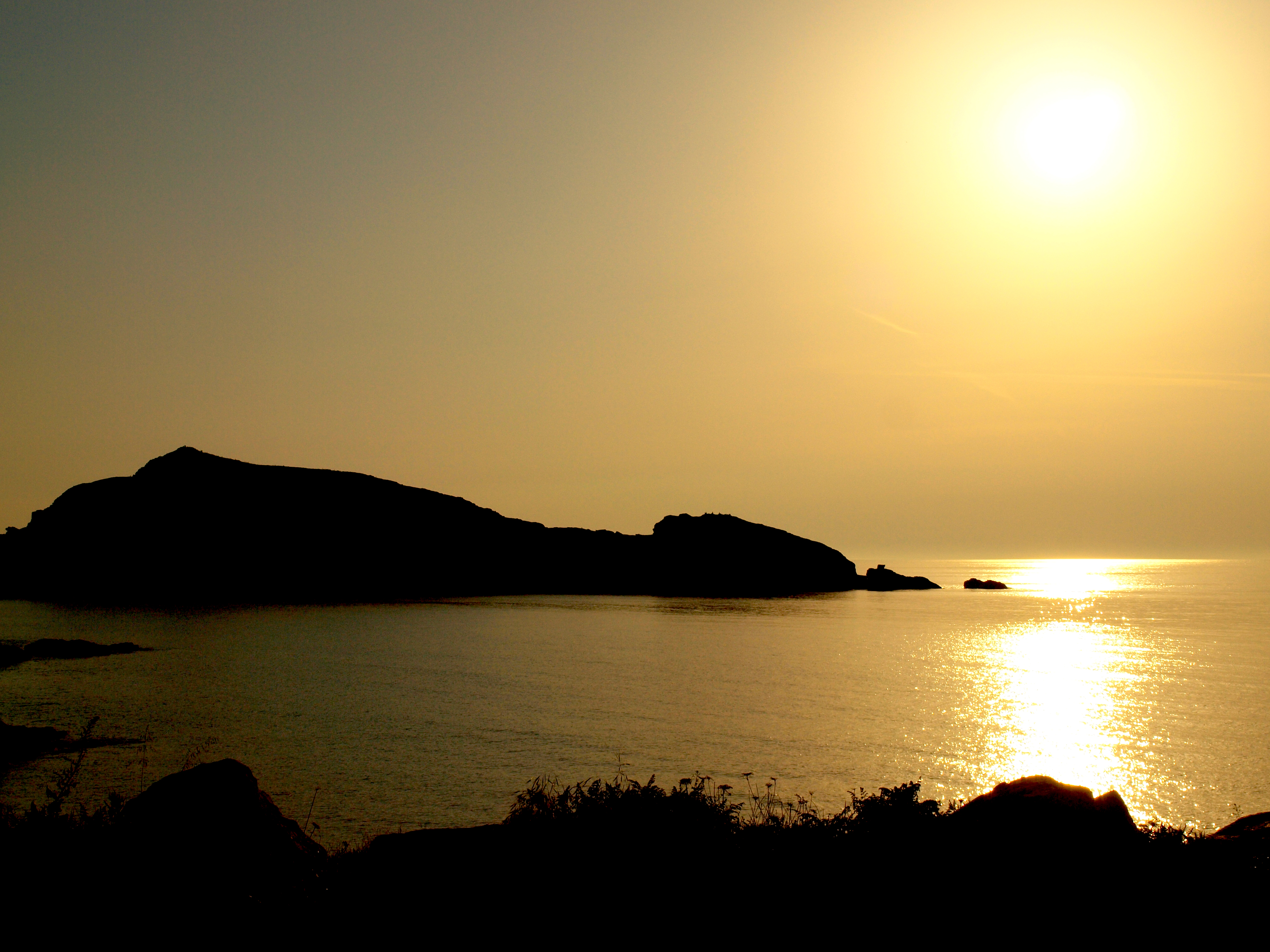 Centuri (Corsica) - Coucher de soleil sur l'île de Capense